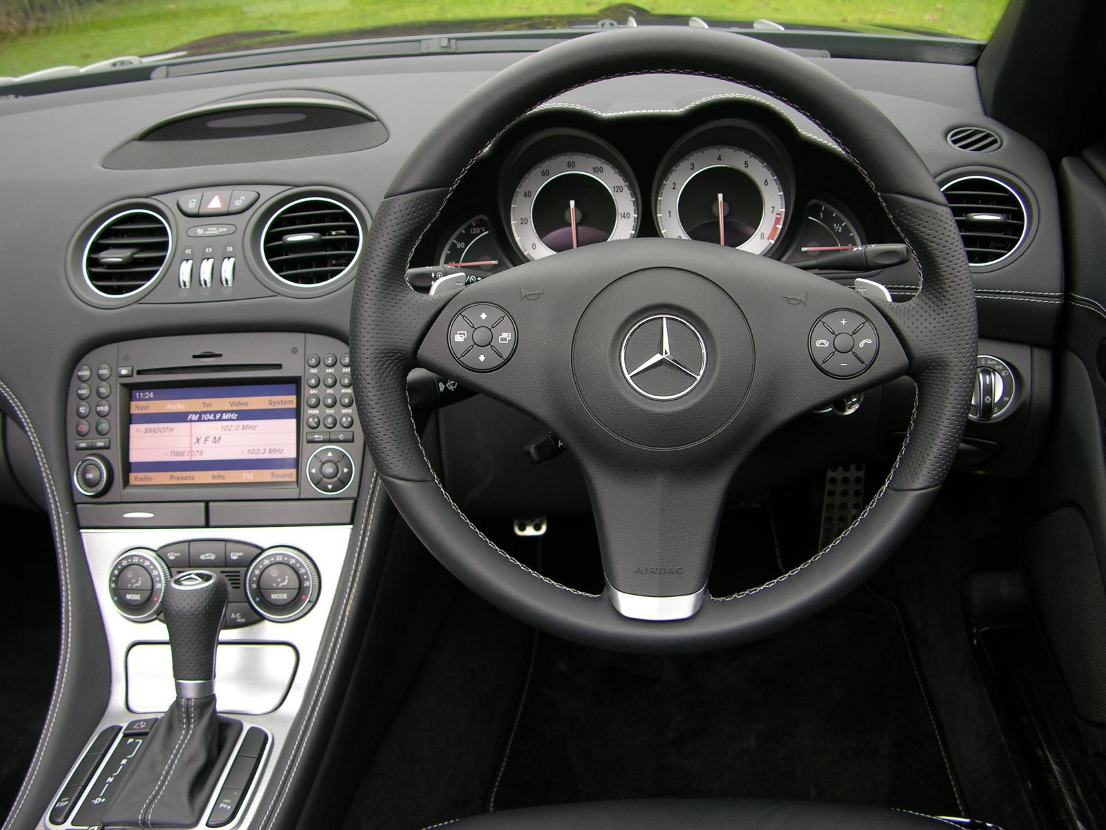 2009 Mercedes Benz SL350